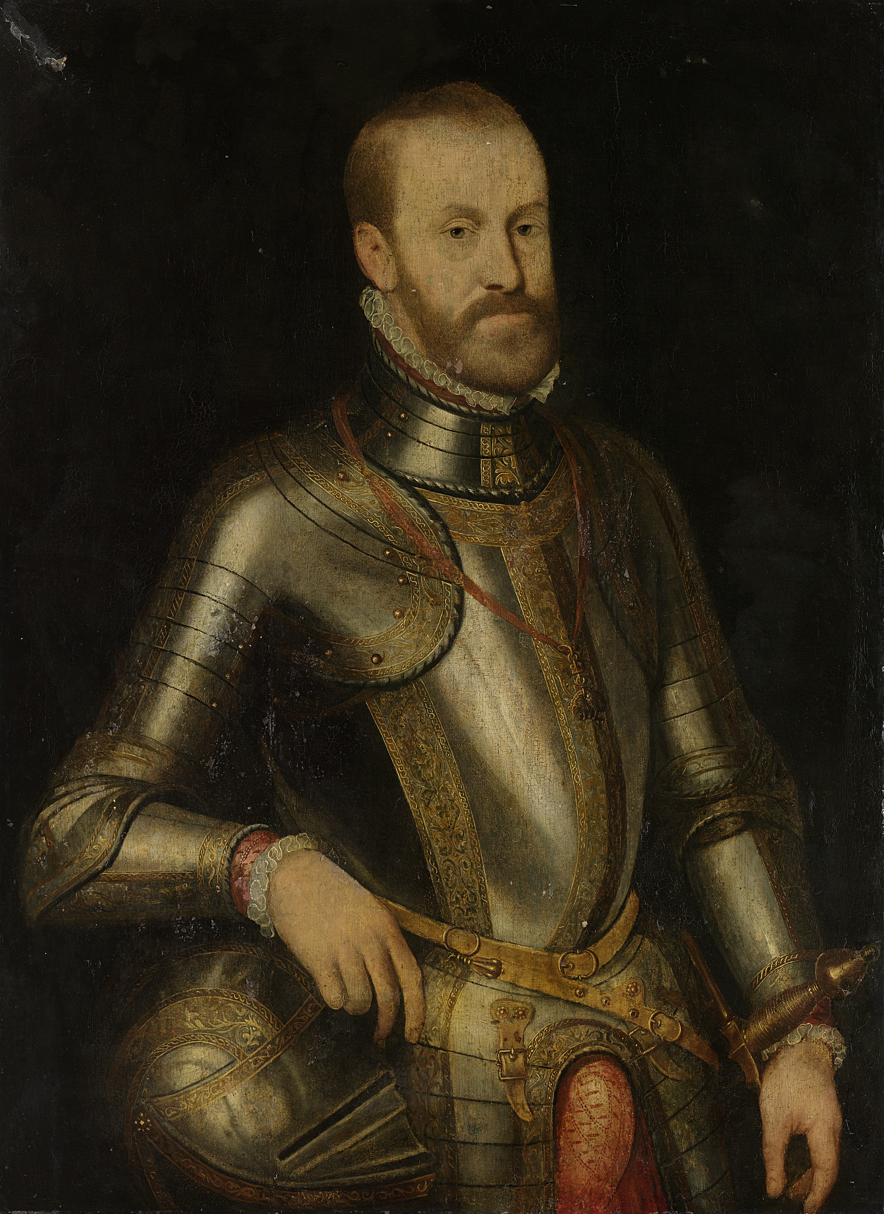 Portret van Philips II, koning van Spanje. Staande ten halven lijve, in wapenrusting, naar rechts. De rechterhand rust op de helm die voor hem staat. Om de hals het embleem van de Orde van het Gulden Vlies aan een lint.